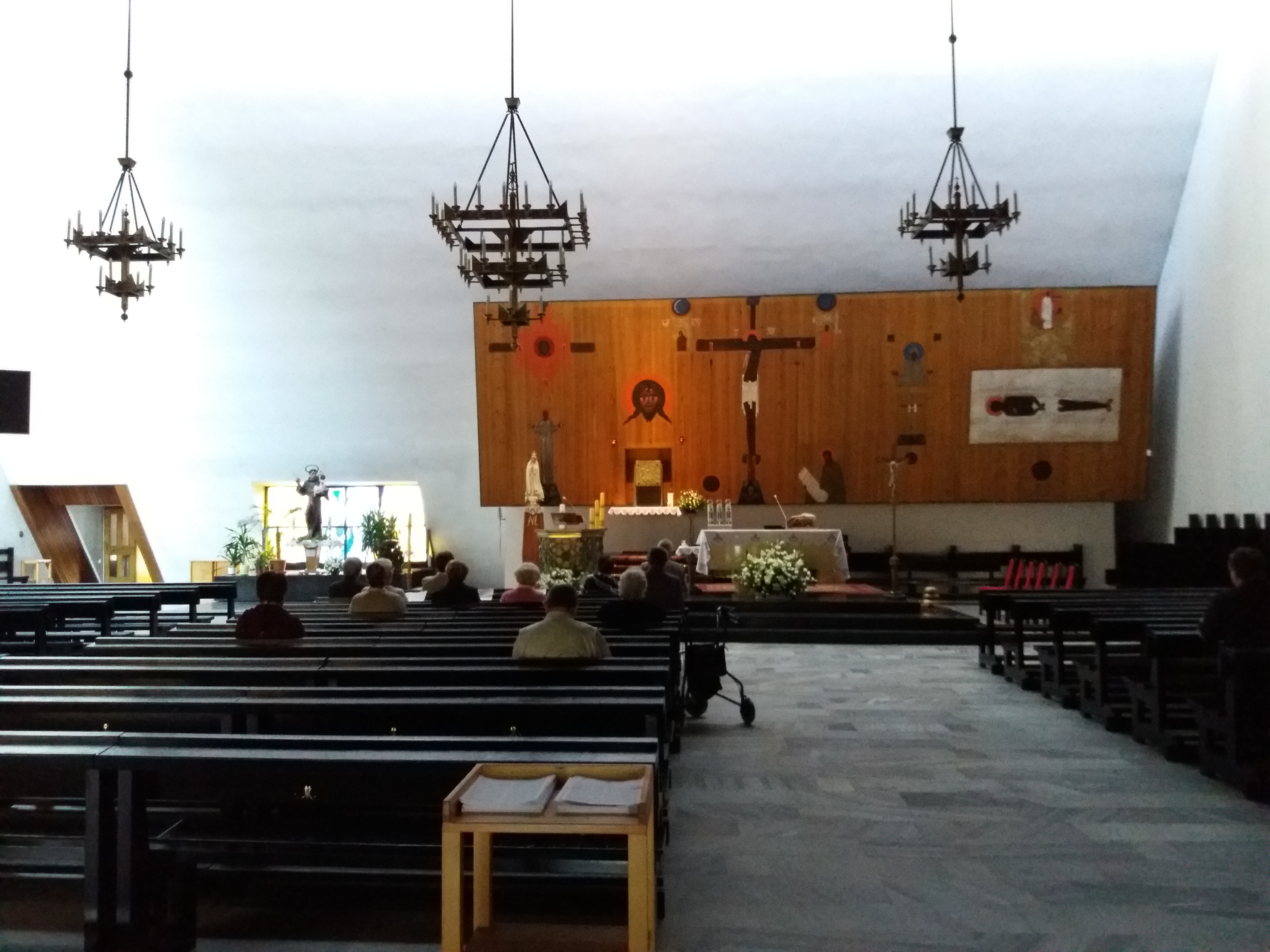 Kościół Niepokalanego Poczęcia Maryi Panny w Krakowie-Azorach - widok wnętrza